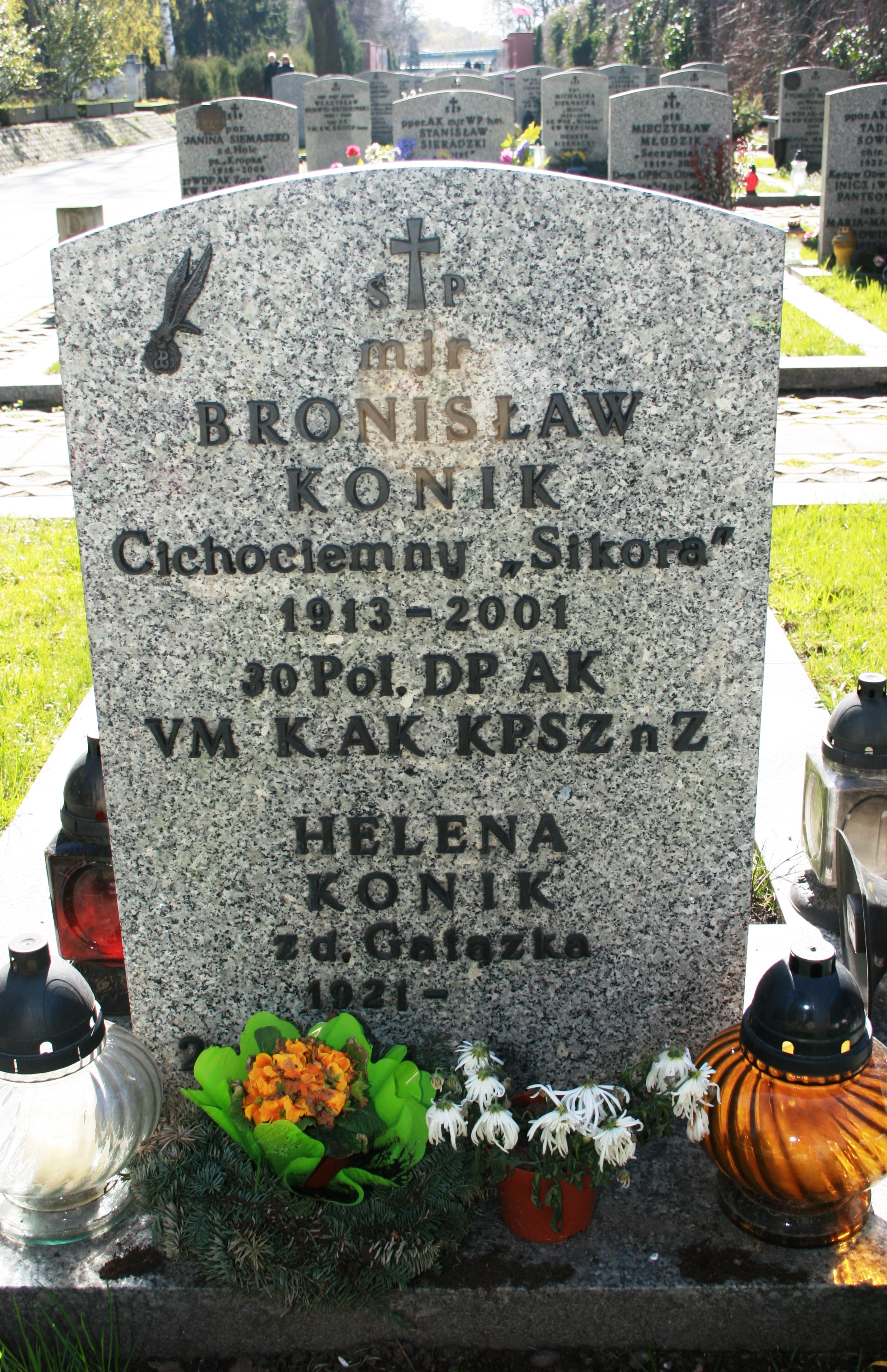 Grób w Panteonie Żołnierzy Polski Walczącej (kwatera D18) na Cmentarzu Wojskowym w Warszawie